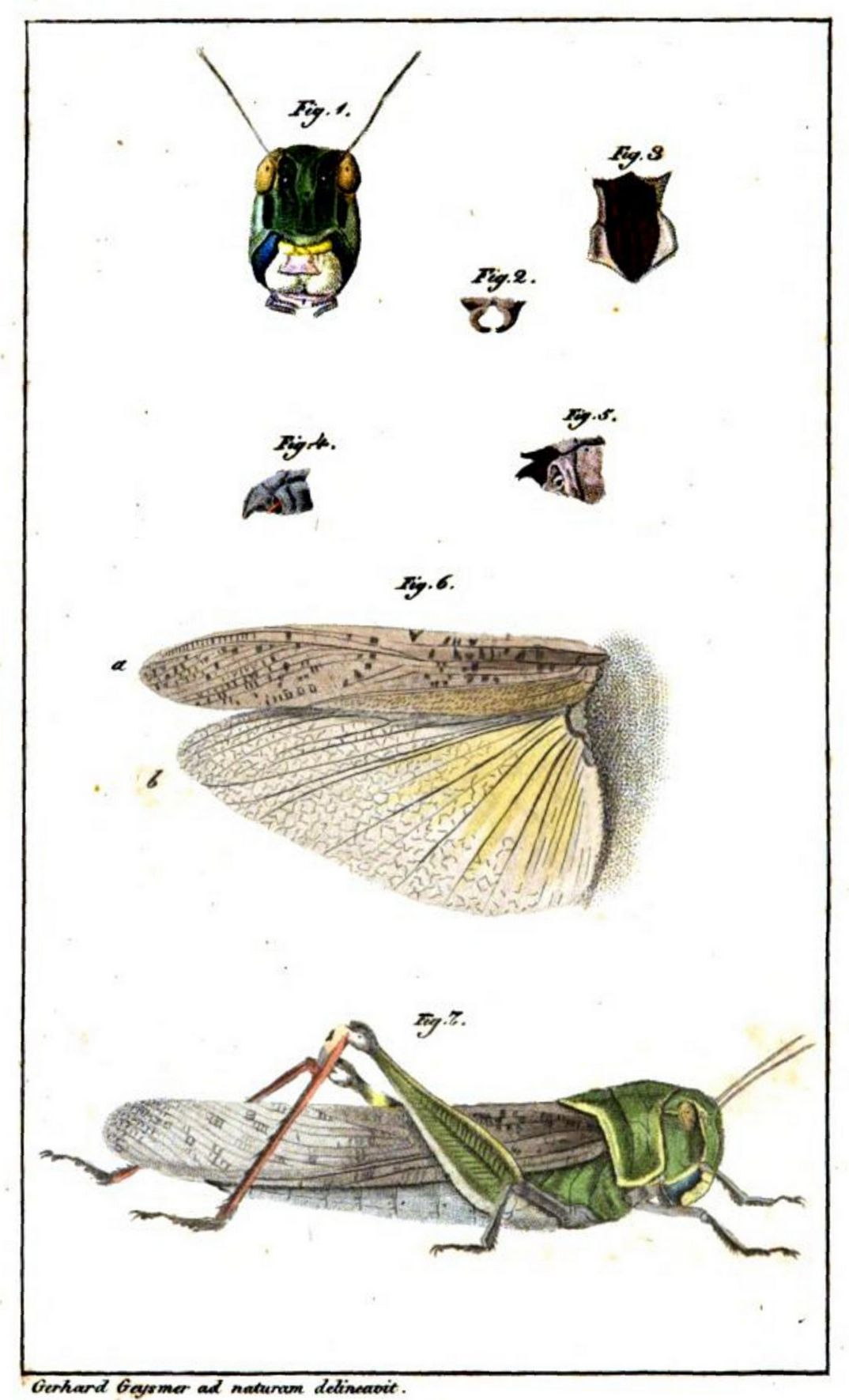 Deitsch: Die Strich-, Zug- oder Wander-Heuschrecke, 1828